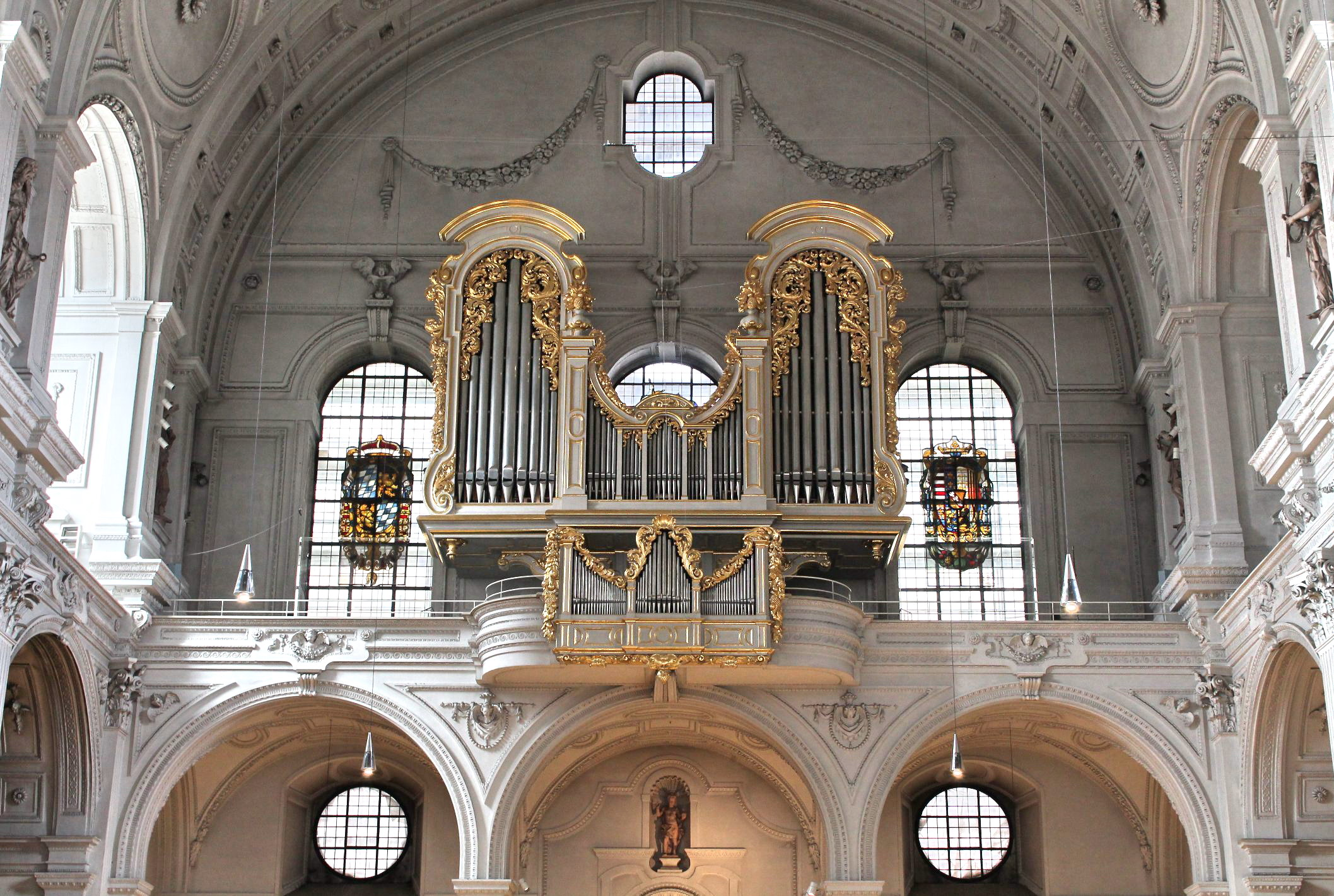 Orgel von St. Michael in München (2011, Rieger, IV/75)